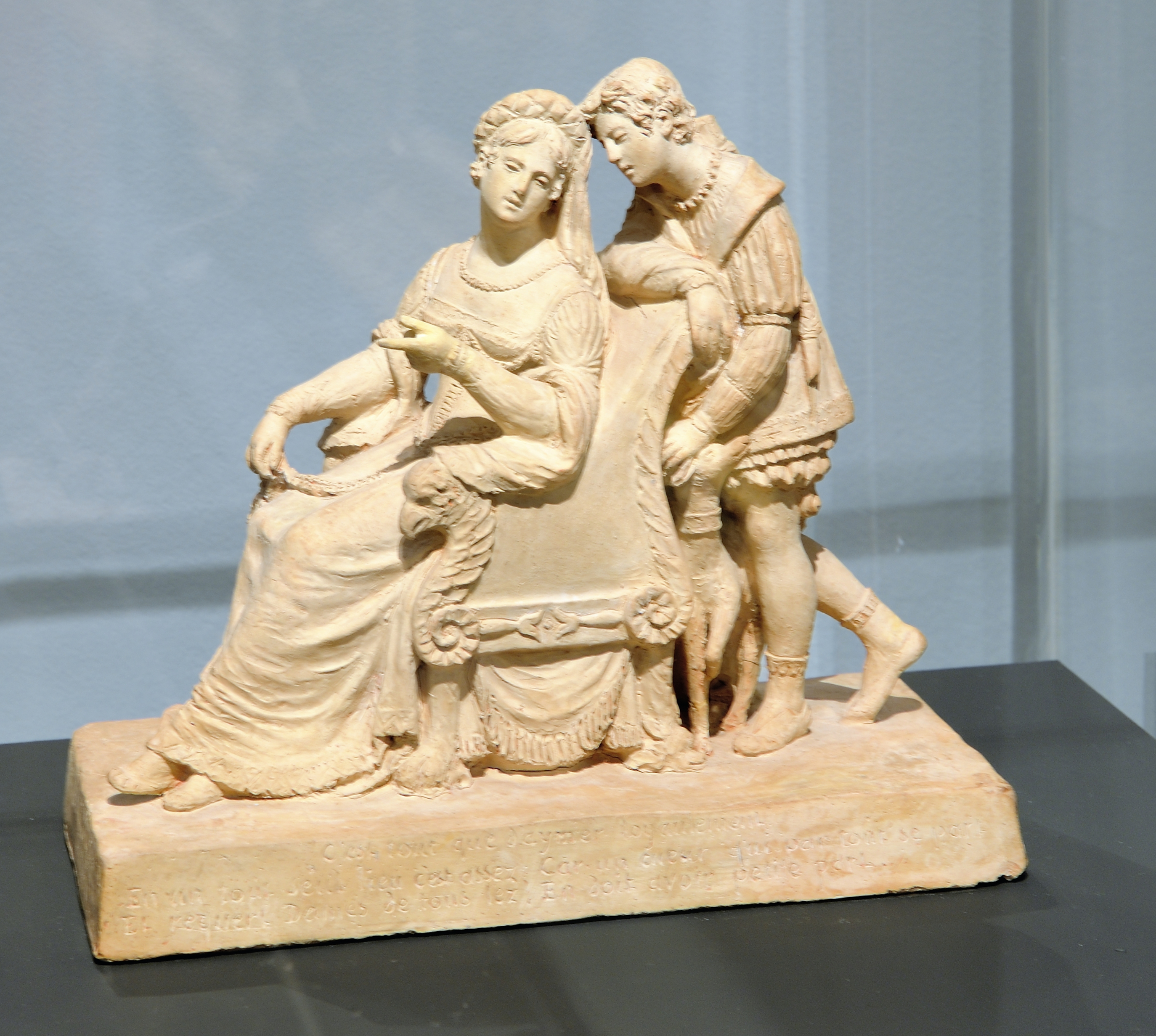 Dame conseillant un page, ou Jehan de Saintré et la Dame des Belles Cousines par Clémence Sophie de SERMEZY.